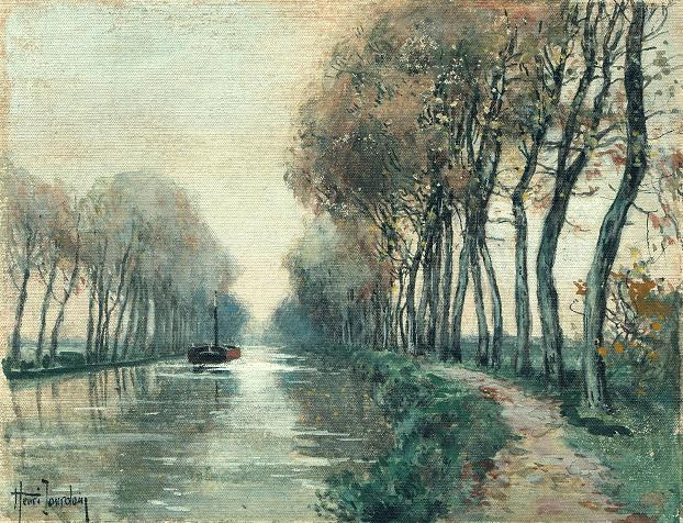 Журден Анри «Канал осенью». Картина речной пейзаж "Канал осенью" в смешанной технике на холсте. Начало XXвек